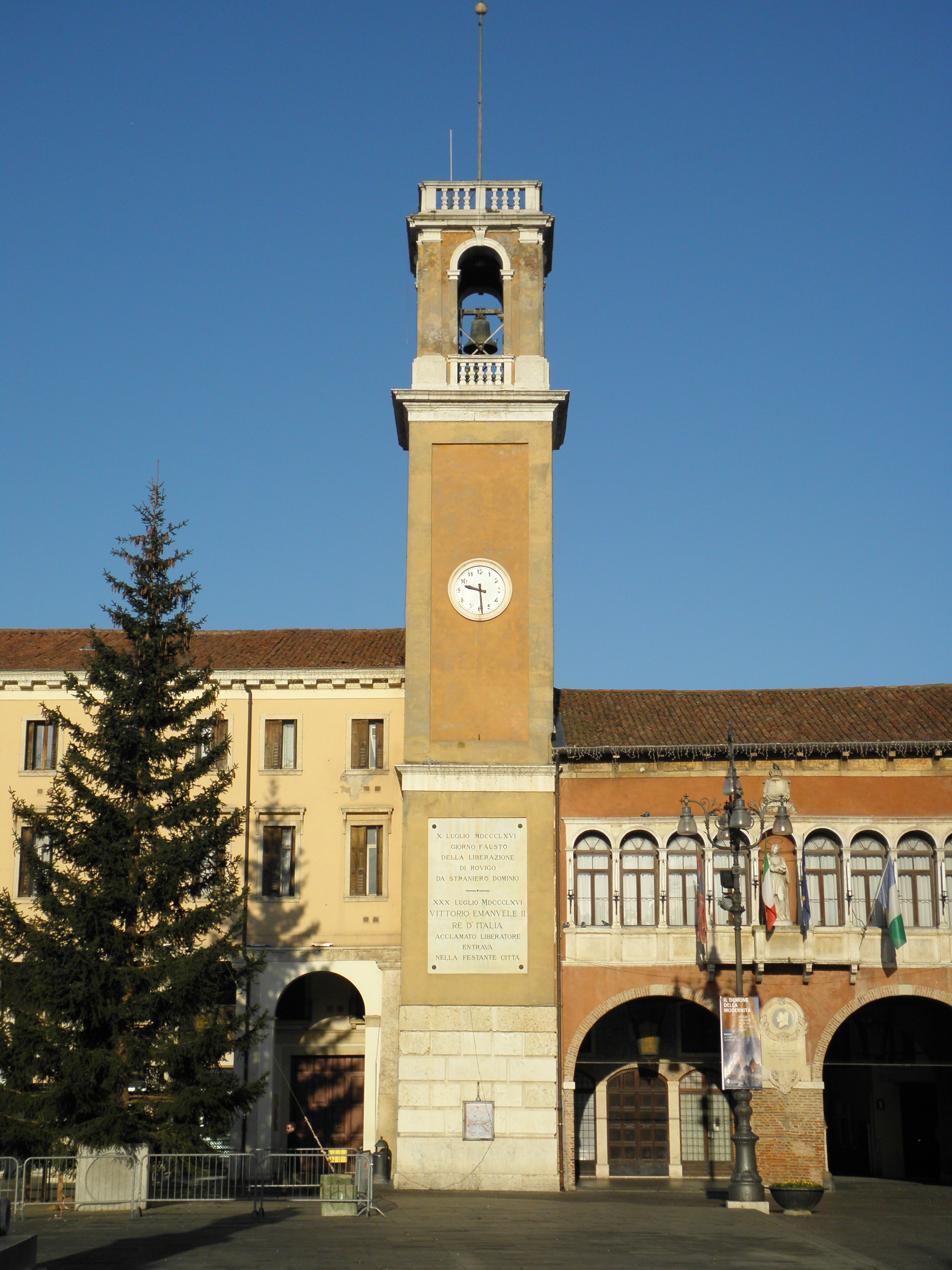 Rovigo, Piazza Vittorio Emanuele II: la torre civica.